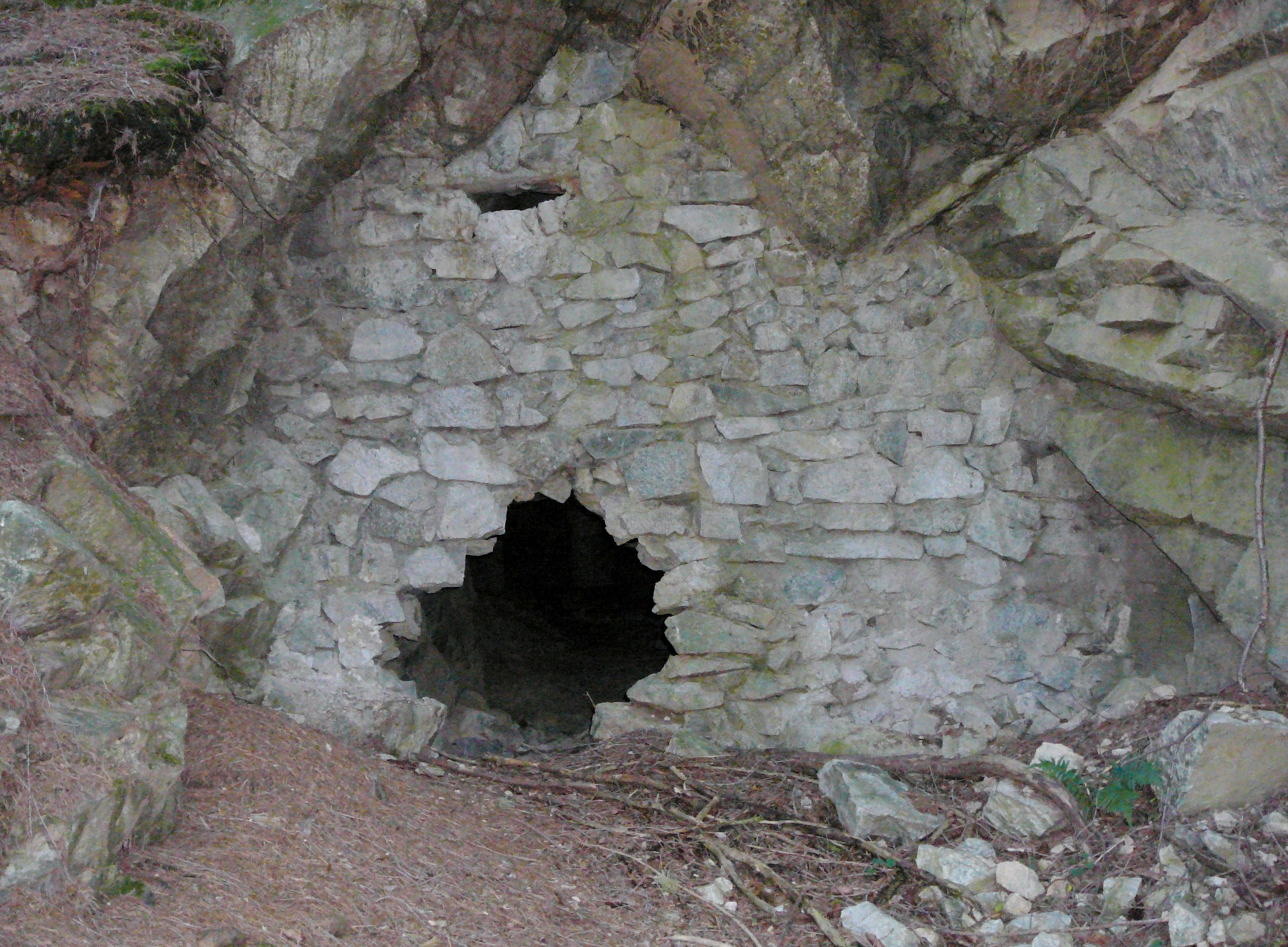 Uno degli attuali accessi all'Opera 5 dello sbarramento di Sciaves